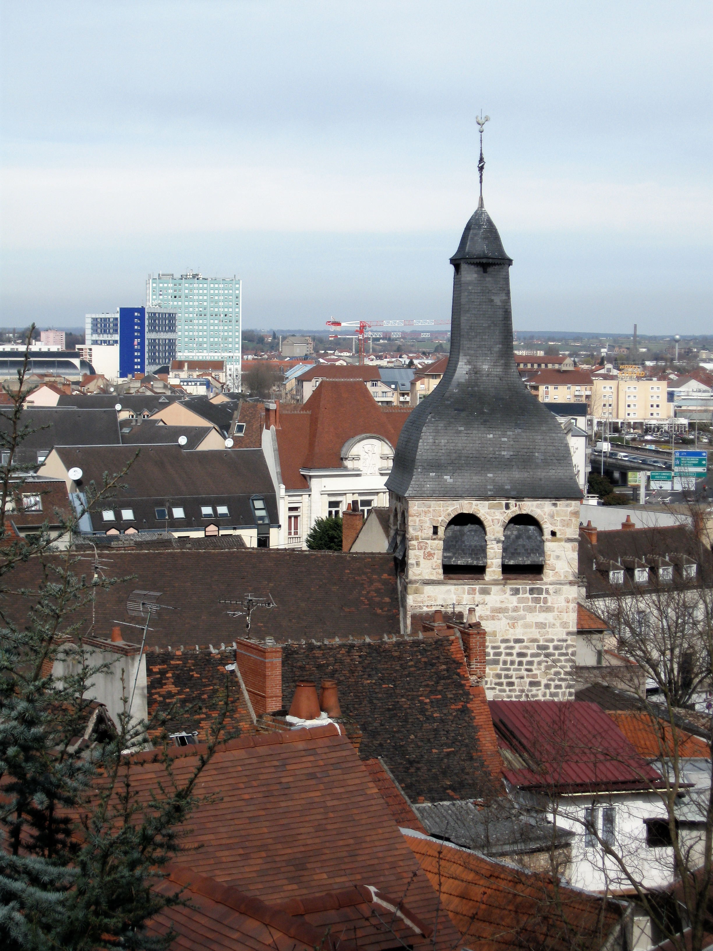 Église Saint-Pierre, Montluçon, Allier, France